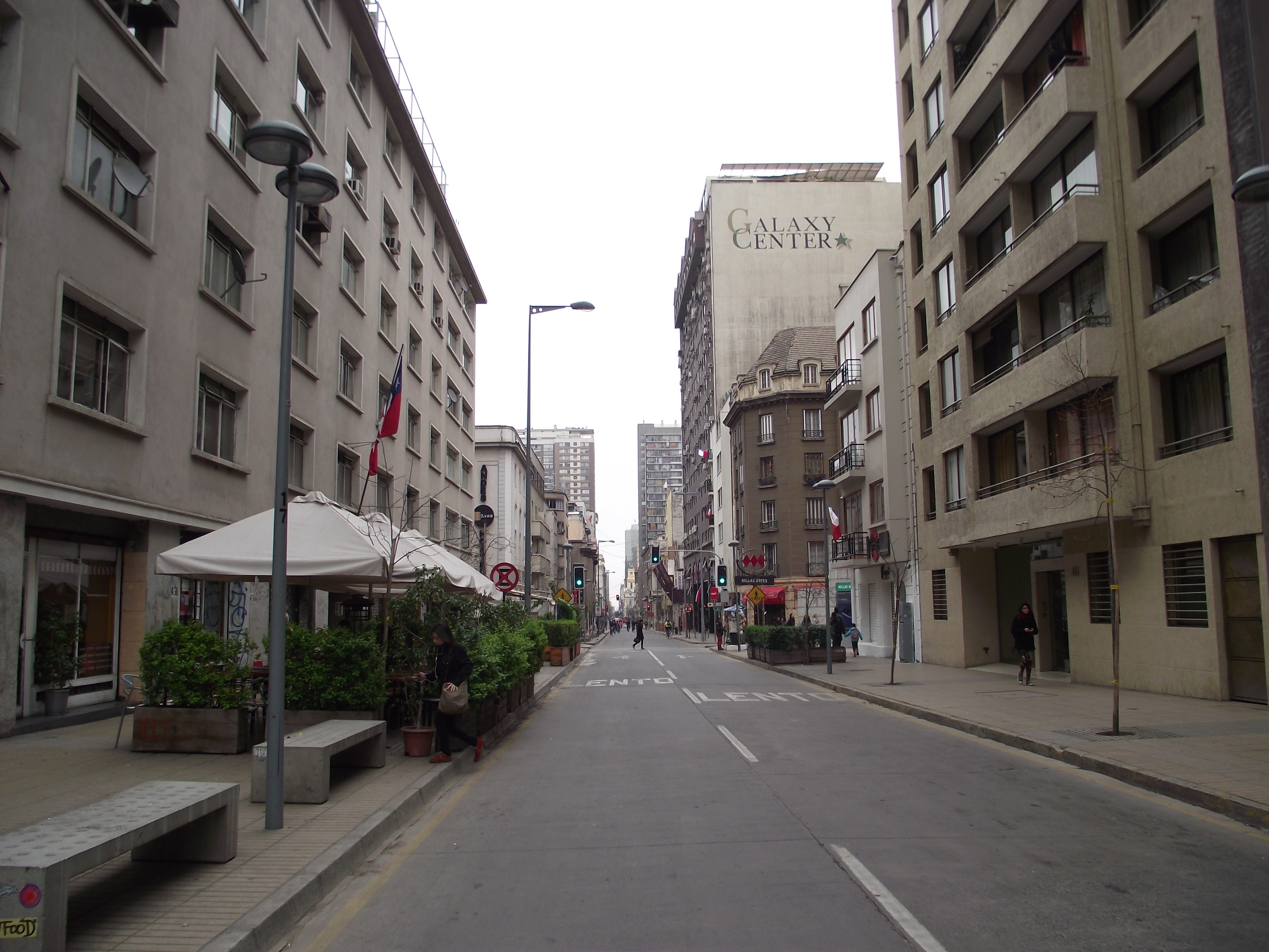 Vista de calle Monjitas en Santiago Centro en dirección hacia el poniente. Foto tomada desde la intersección con José Miguel de la Barra.